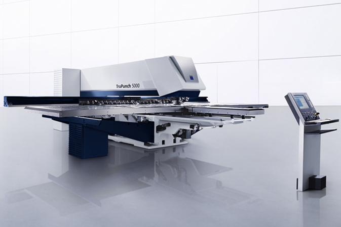 TruPunch 5000 Stanzmaschine von TRUMPF